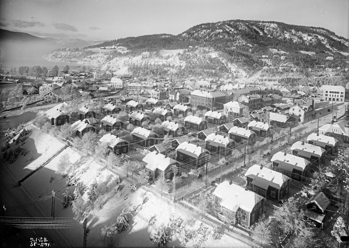 Arbeiderbydelen Grønnbyen på Notodden. Anlagt 1906–1910